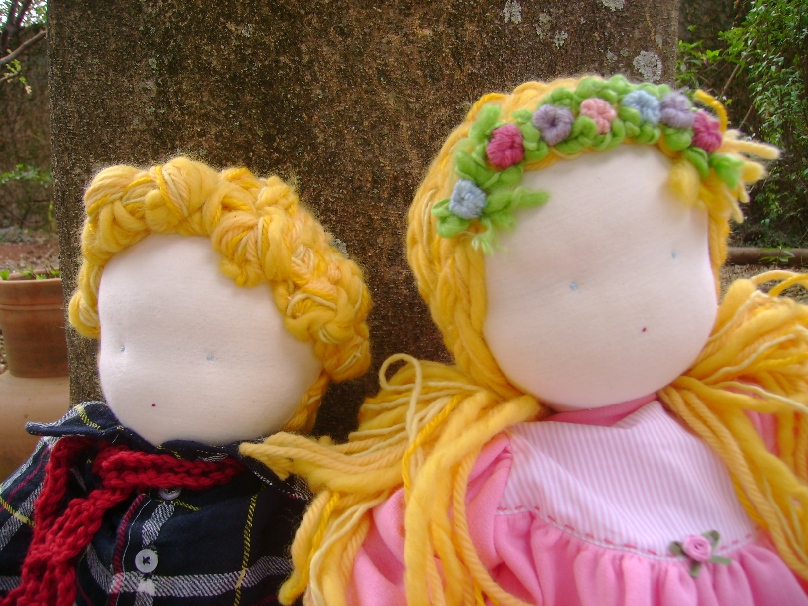 Waldorf dolls by Nina Veiga